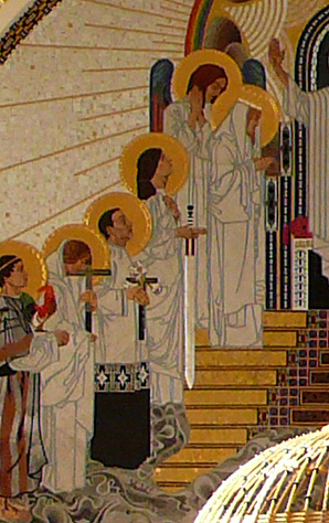 Hl. Dymphna